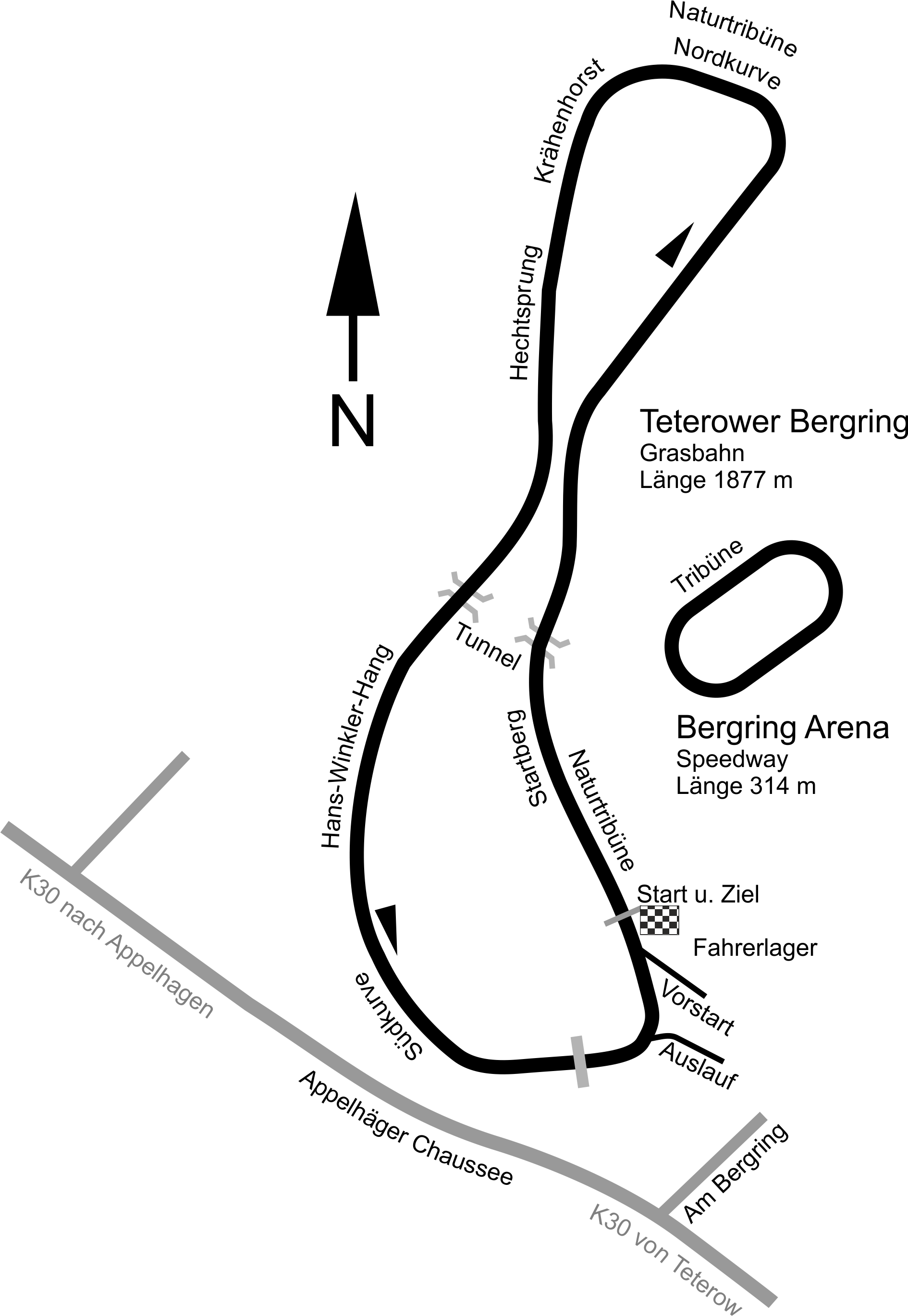 Streckengrafik Teterower Bergring